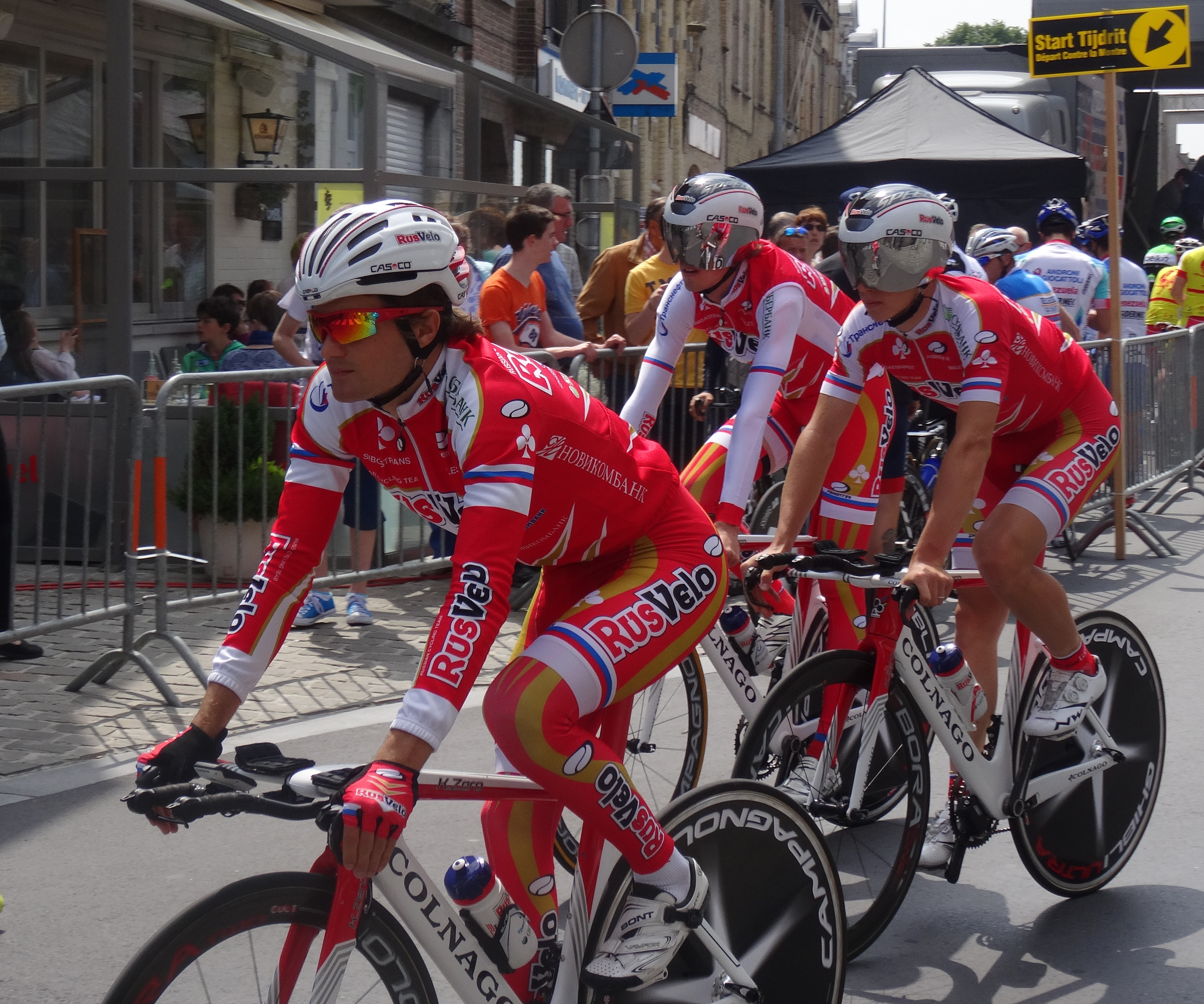 Reportage photographique réalisé le vendredi 30 mai à l'occasion du contre-la-montre individuel de la troisième étape du Tour de Belgique 2014 à Dixmude, Belgique.